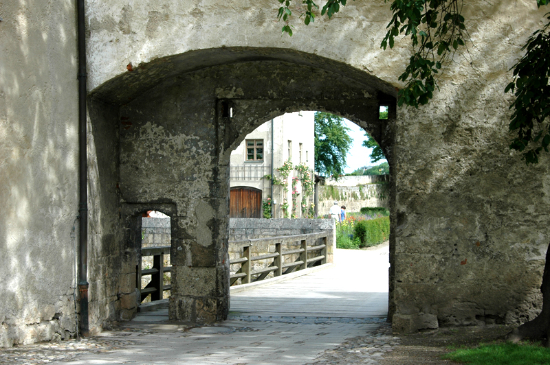 Burg zu Burghausen, typisches Tor beim Kornmesserturm